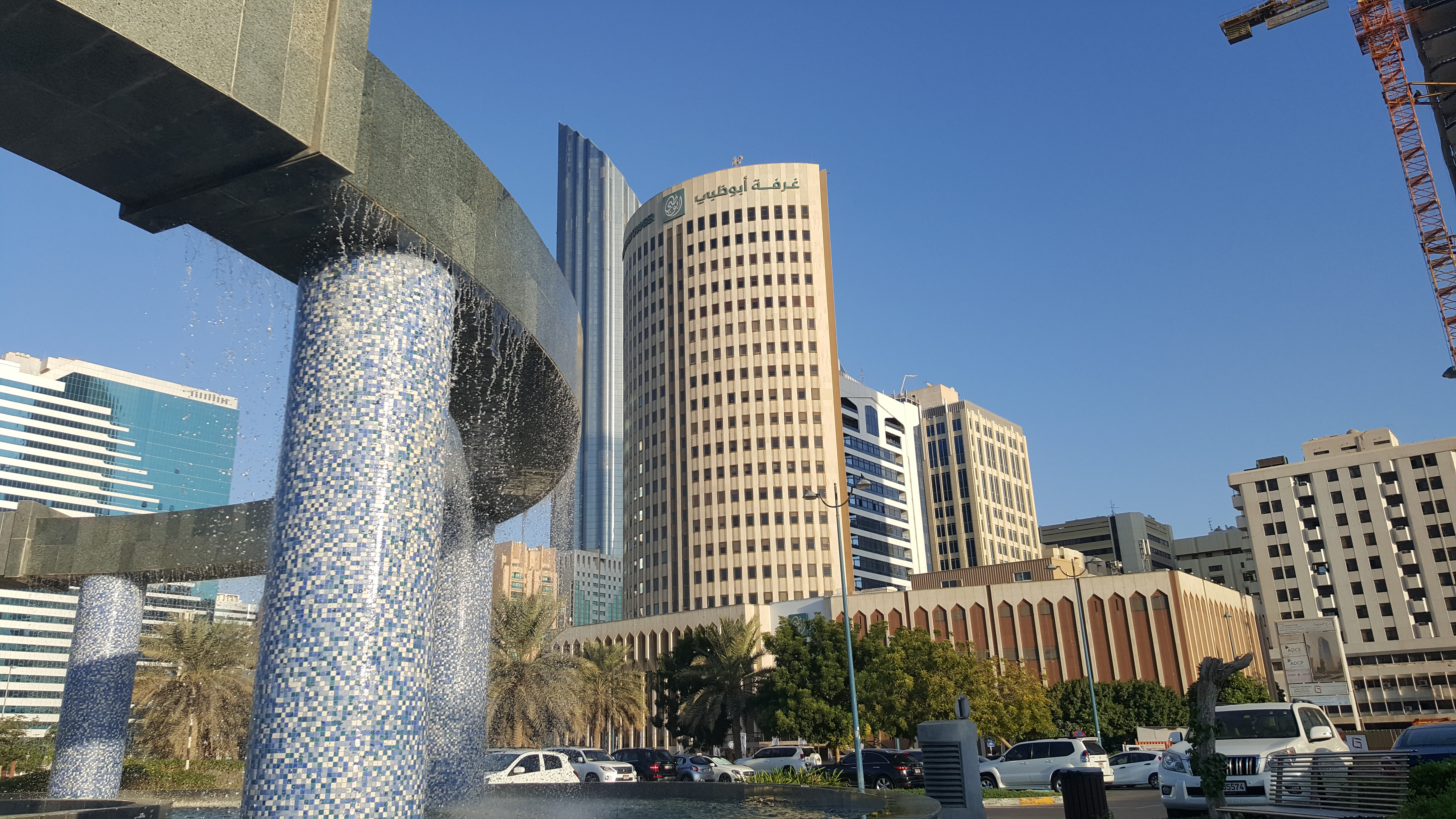 برج غرفة تجارة وصناعة أبوظبي ، الكورنيش - أبوظبي